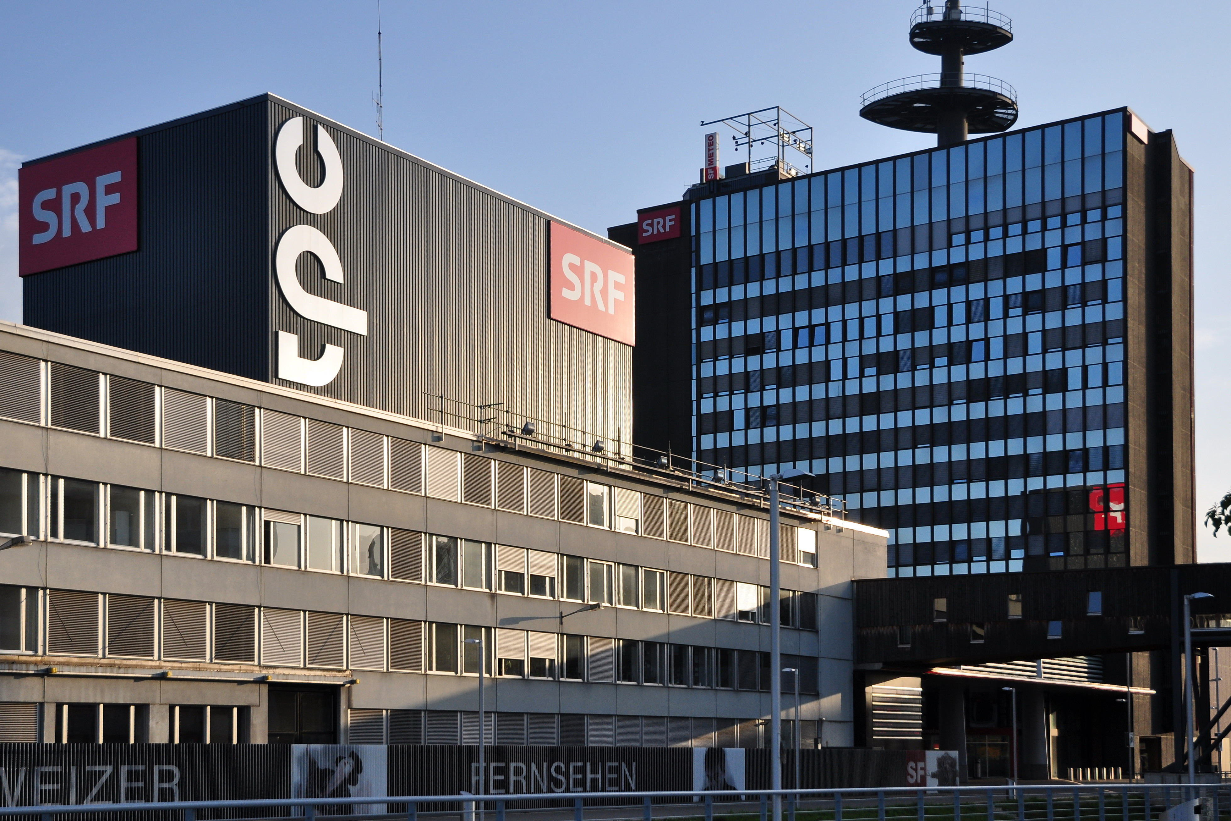 Archiv Schweizer Fernsehen DRS, Fernsehstrasse 1 in Zürich-Seebach (Switzerland)